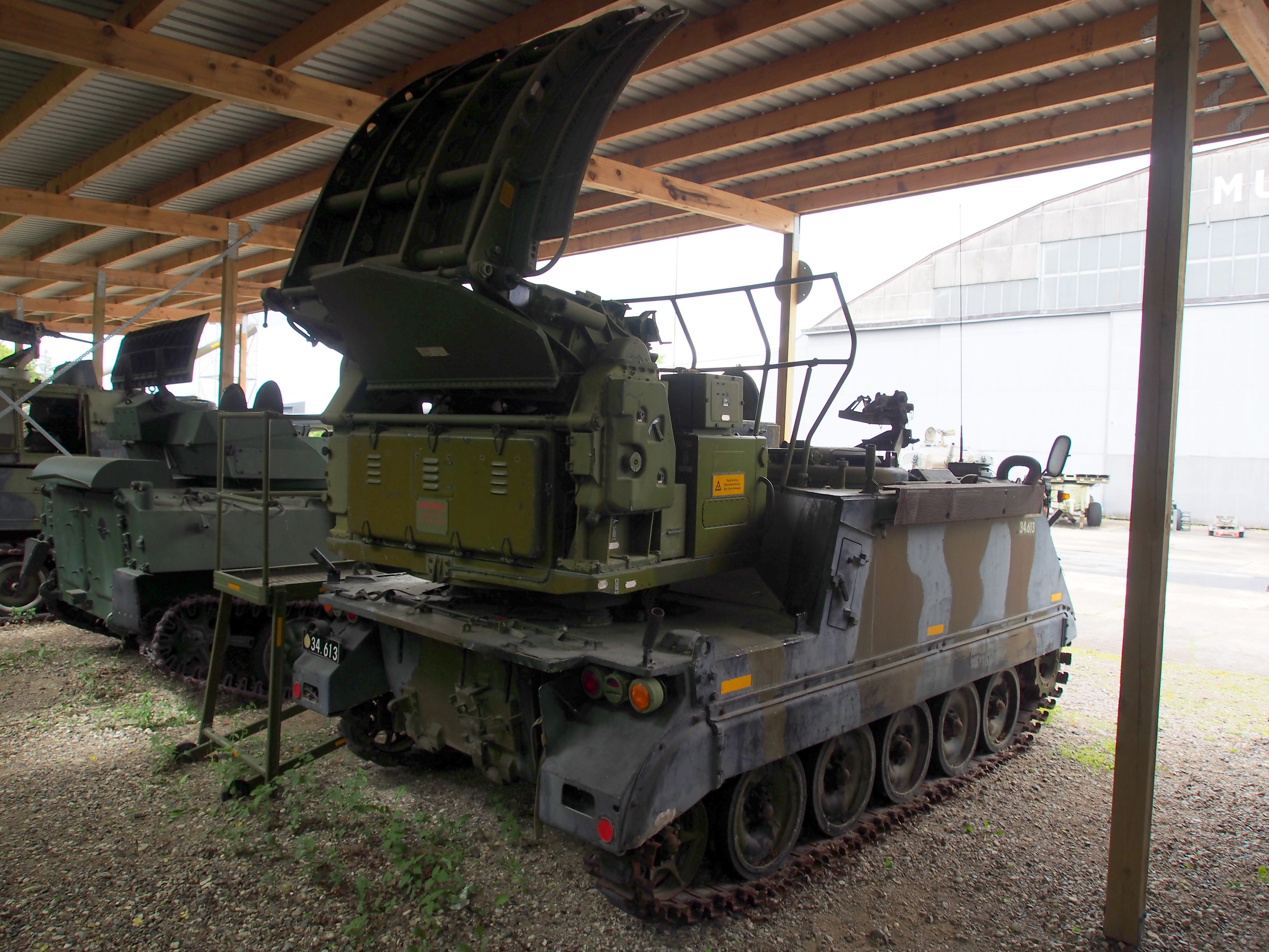 Photographed at Aalborg, Denmark.